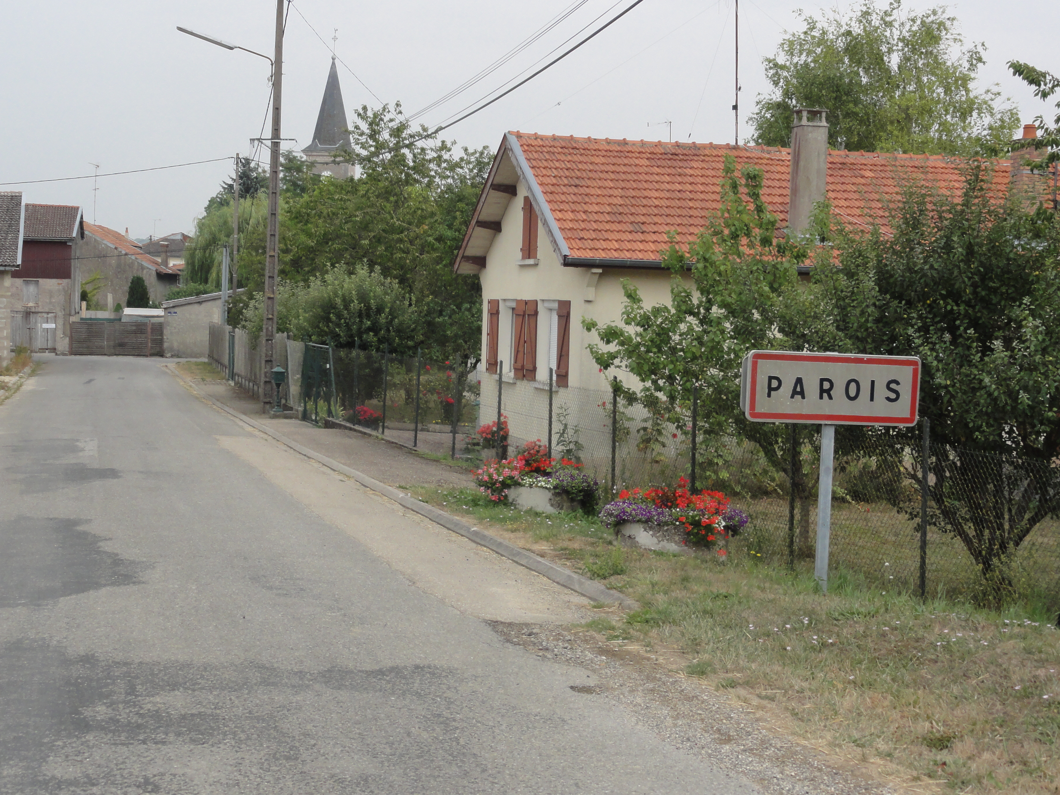 Parois (Clermont-en-Argonne, Meuse) city limit sign